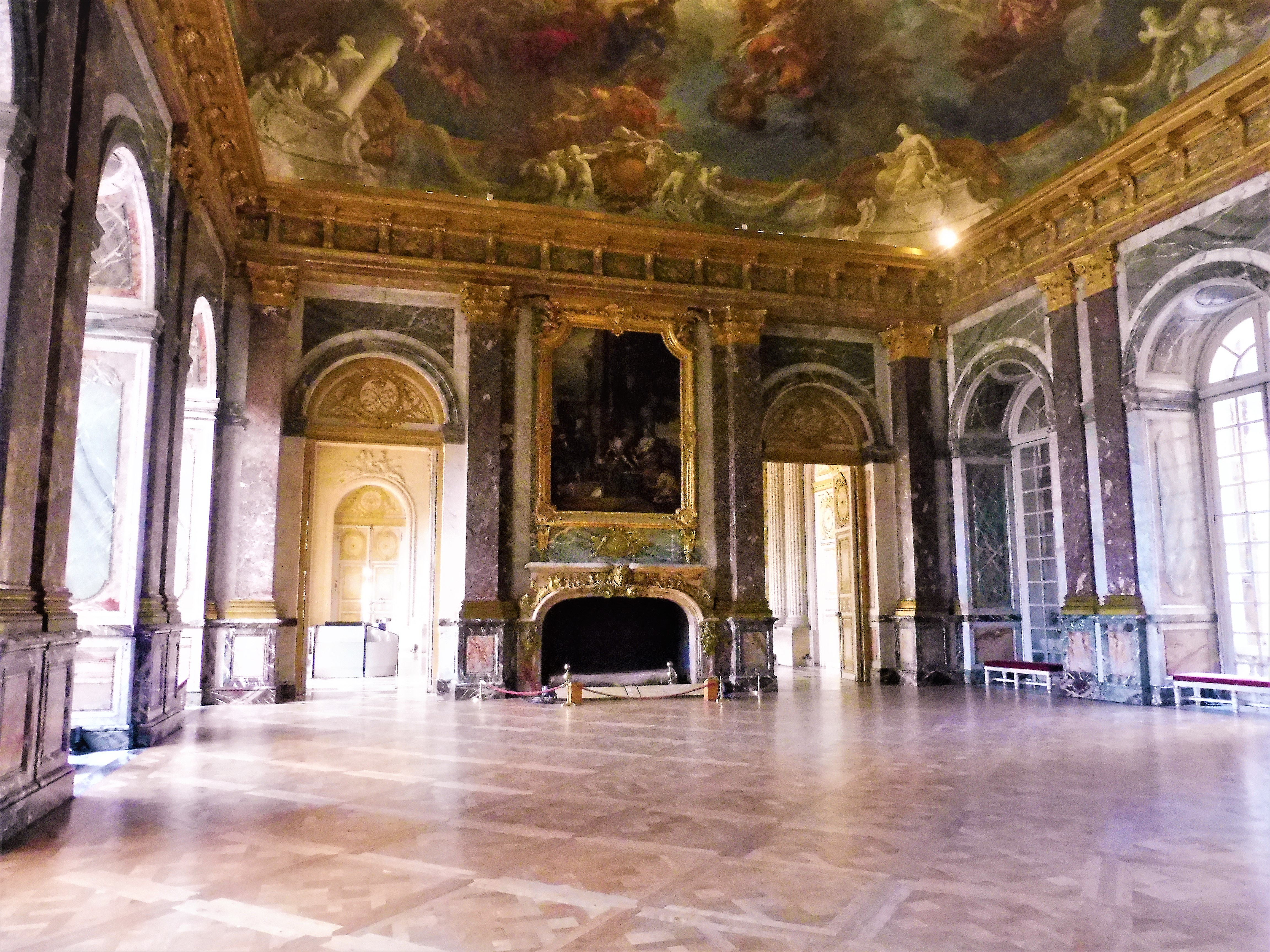 Vue générale du salon d'Hercule au château de Versailles.